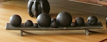 Alvøen Hovedgård kanonkuler